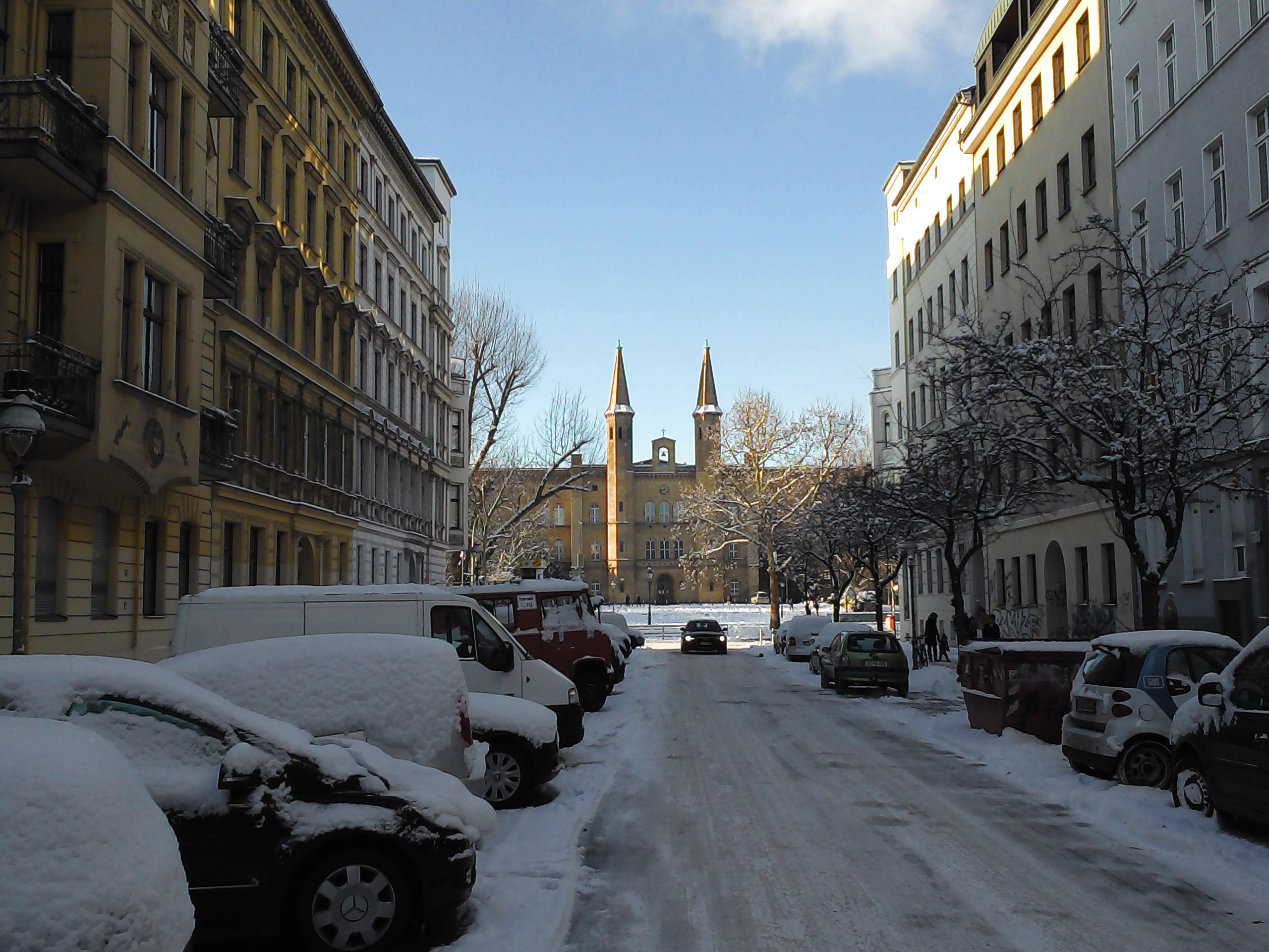 Heutiges Kunstzentrum und ehemaliges Krankenhaus Bethanien in Berlin-Kreuzberg, Germany.